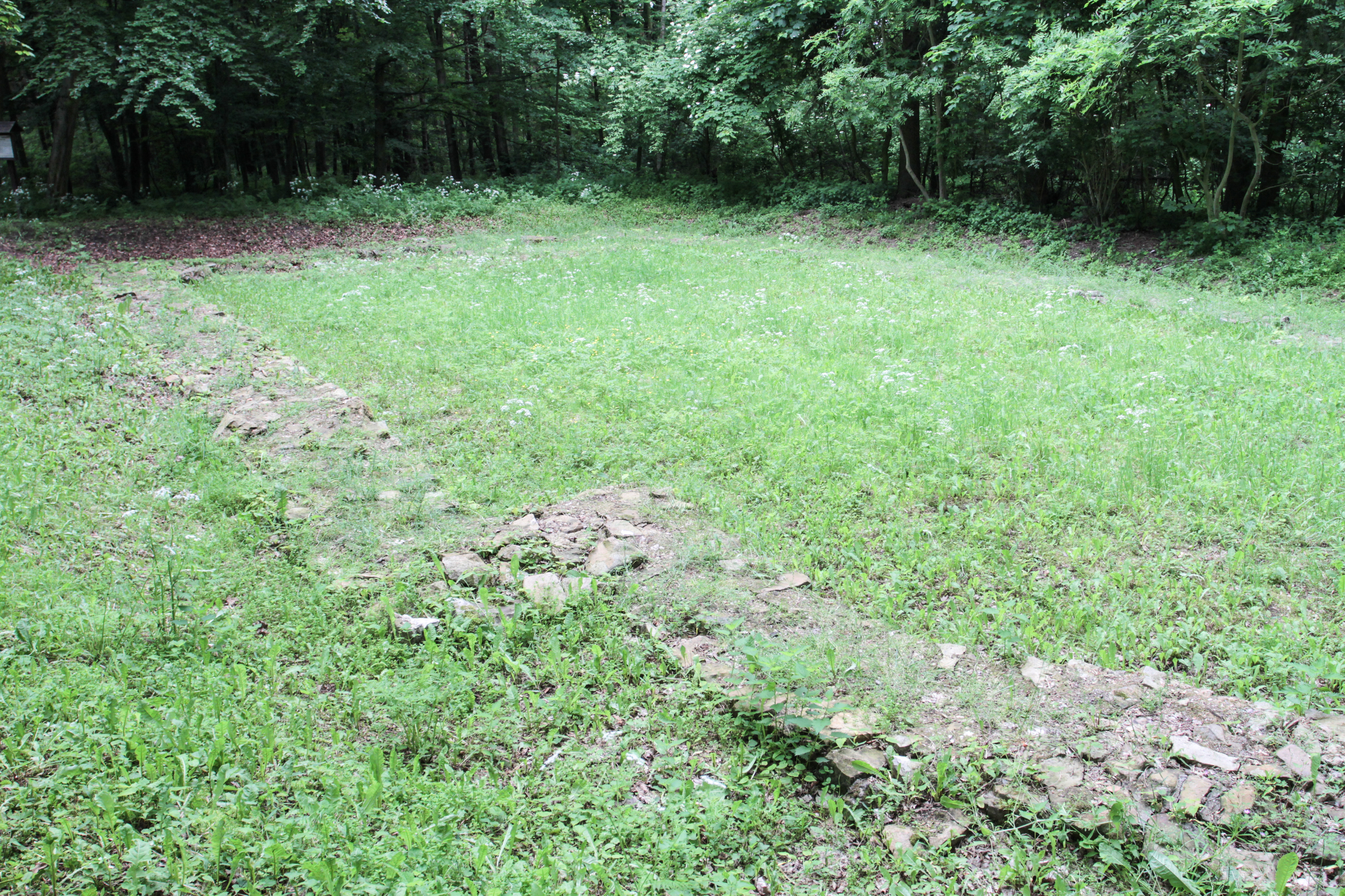 Hradiště Hůrka s rotundou svatého Petra, Starý Plzenec.